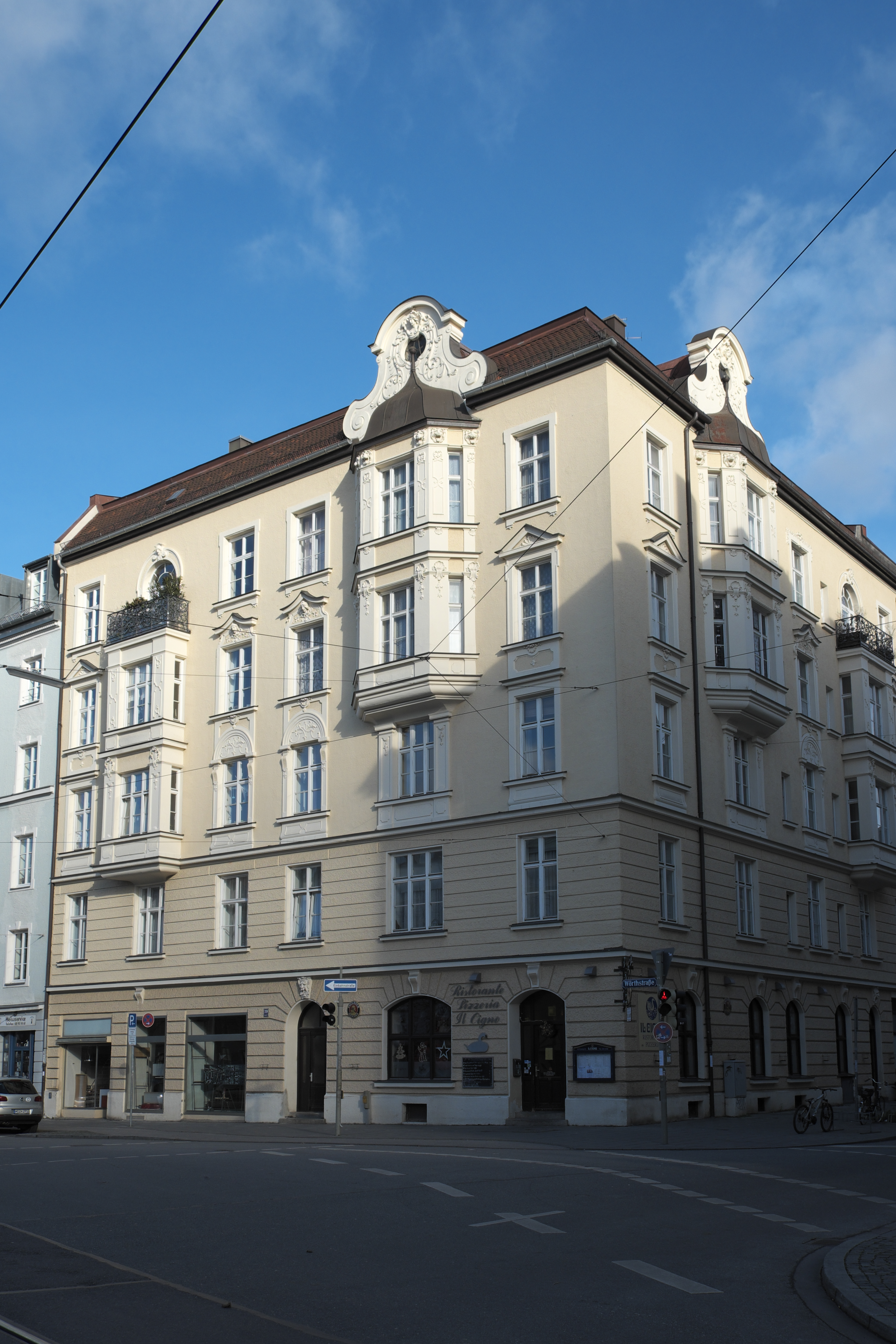 Mietshaus in der Wörthstraße 39 in Haidhausen im Stadtbezirk Au-Haidhausen in München (Bayern/Deutschland), 1897 erbaut